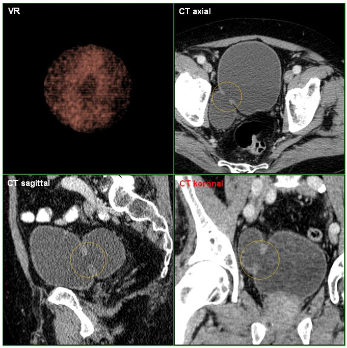 Blasendivertikel in der CT-Darstellung: axial, sagittal, koronal & volume rendered